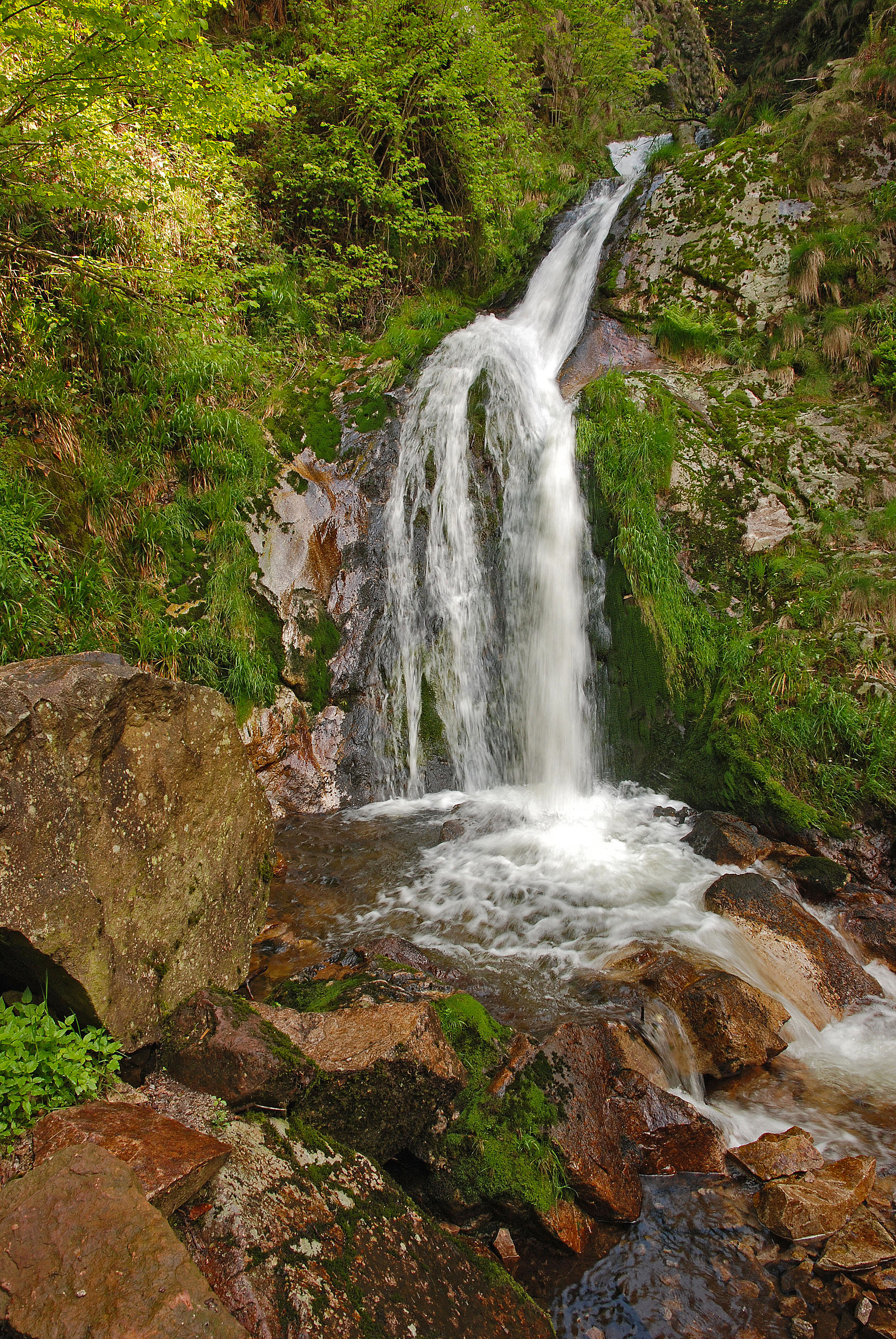 Allerheiligenwasserfall im Naturpark Schwarzwald Mitte/Nord Deutschland, bei Oppenau, Germany, Black Forest